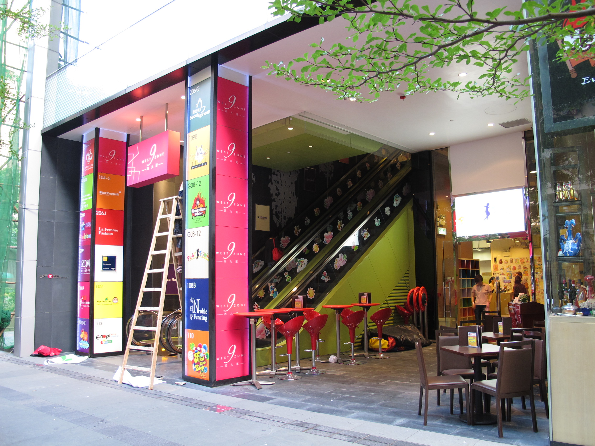 West9Zone Mall Entrance 西九匯